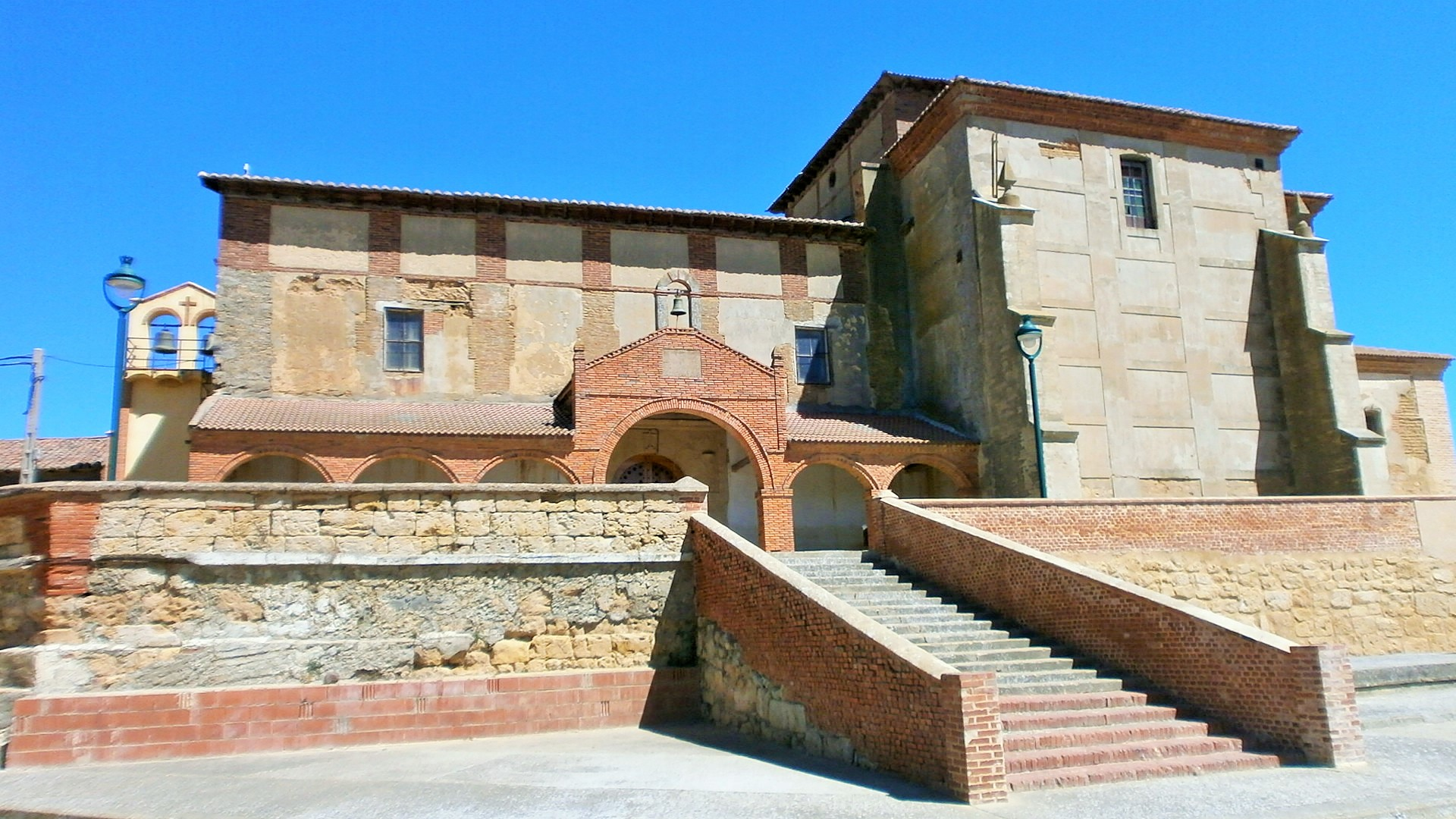 Matadeón de los Oteros